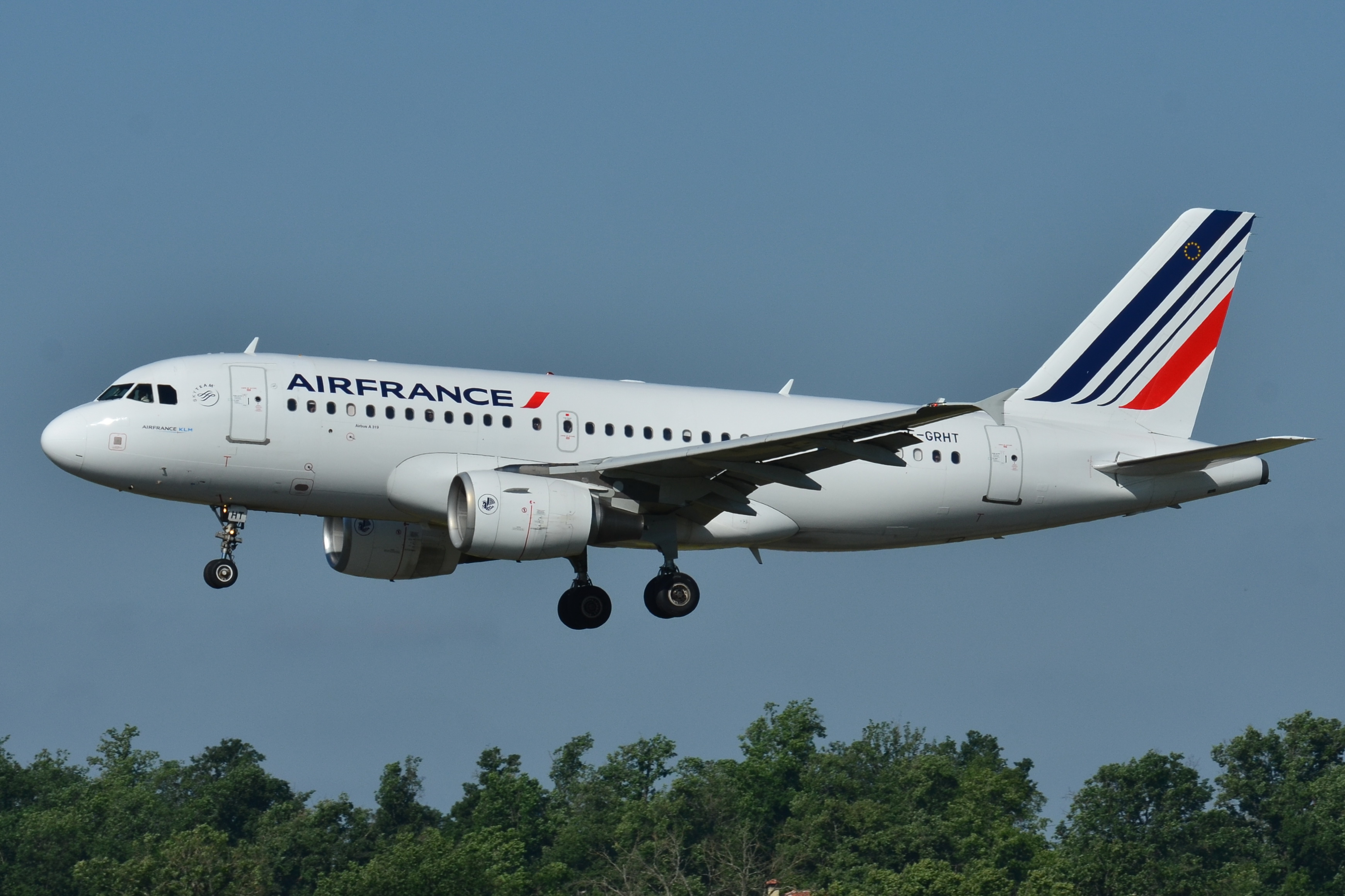 Photo prise à l'aéroport de Toulouse-Blagnac (LFBO) en France. Picture take at Toulouse-Blagnac Airport (LFBO) in France.